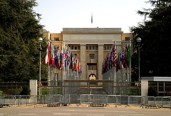 Der Eingang zum Palais des Nations in Genf